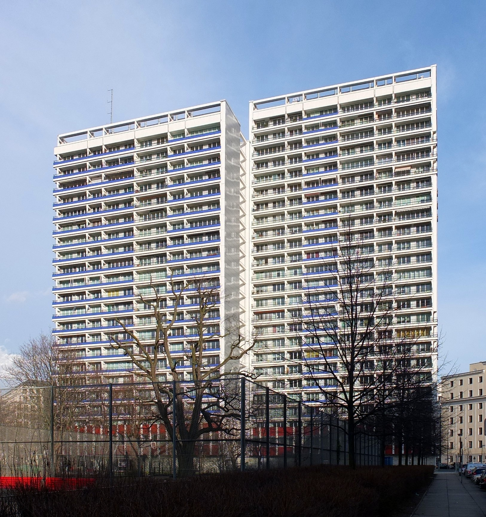 Wohnhochhaus Leipziger Straße 48/49 in Berlin-Mitte (Ansicht von der Krausenstraße)